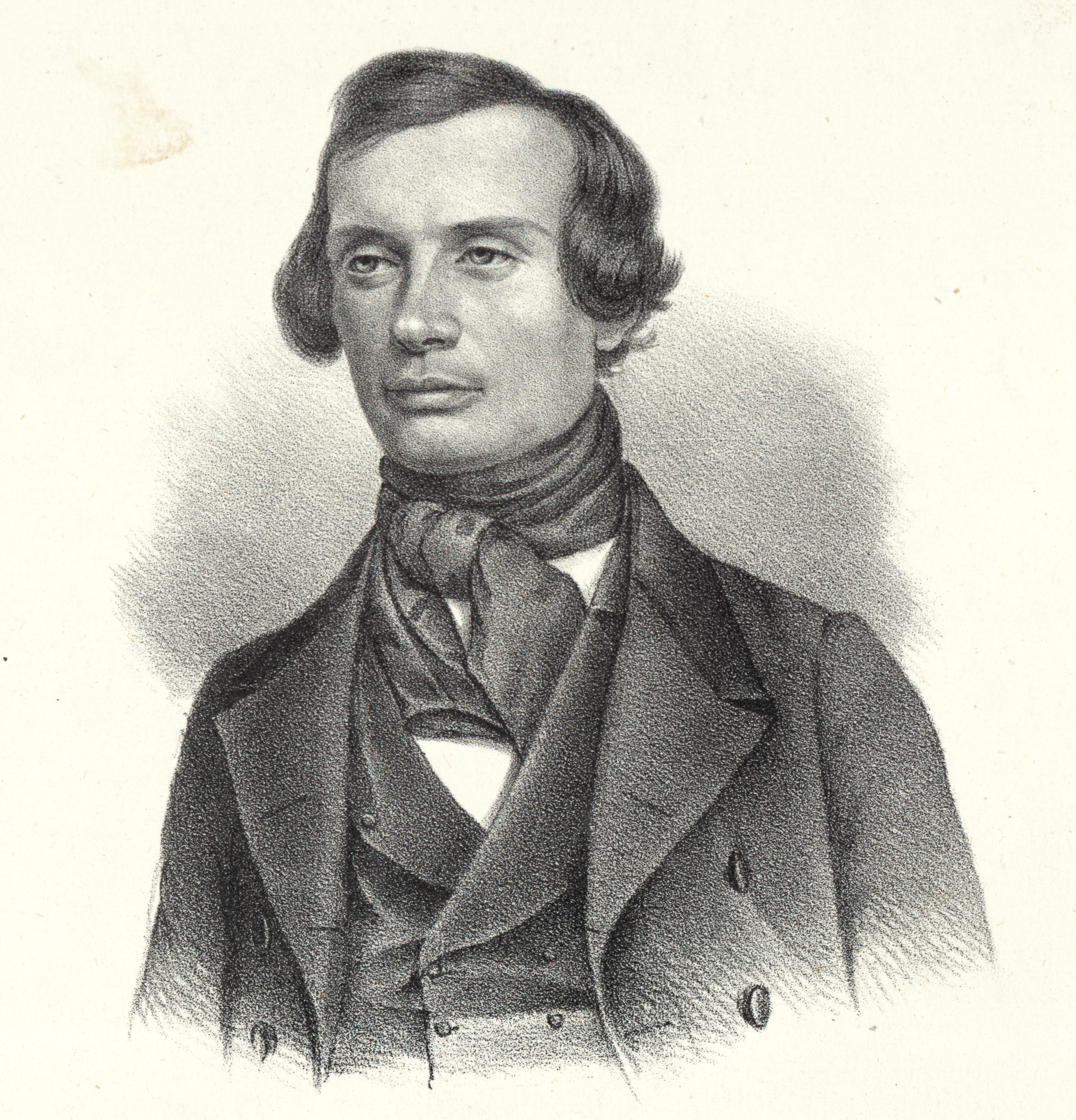 Johan Nybom (1815-1889)